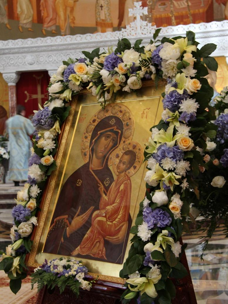 Тихвинская икона Божией Матери, чудесно явившаяся в 1383 году в новгородских пределах – одна из особо почитаемых на Руси. В монастыре с самого его основания пребывал чтимый список Тихвинской иконы, созданный в Большом Тихвинском монастыре. После революции эта икона бесследно исчезла, но в 2008 году сестры иконописной мастерской монастыря написали точный список с древнего чудотворного Тихвинского образа. Он был освящен в городе Тихвине и торжественным крестным ходом принесен в обитель.